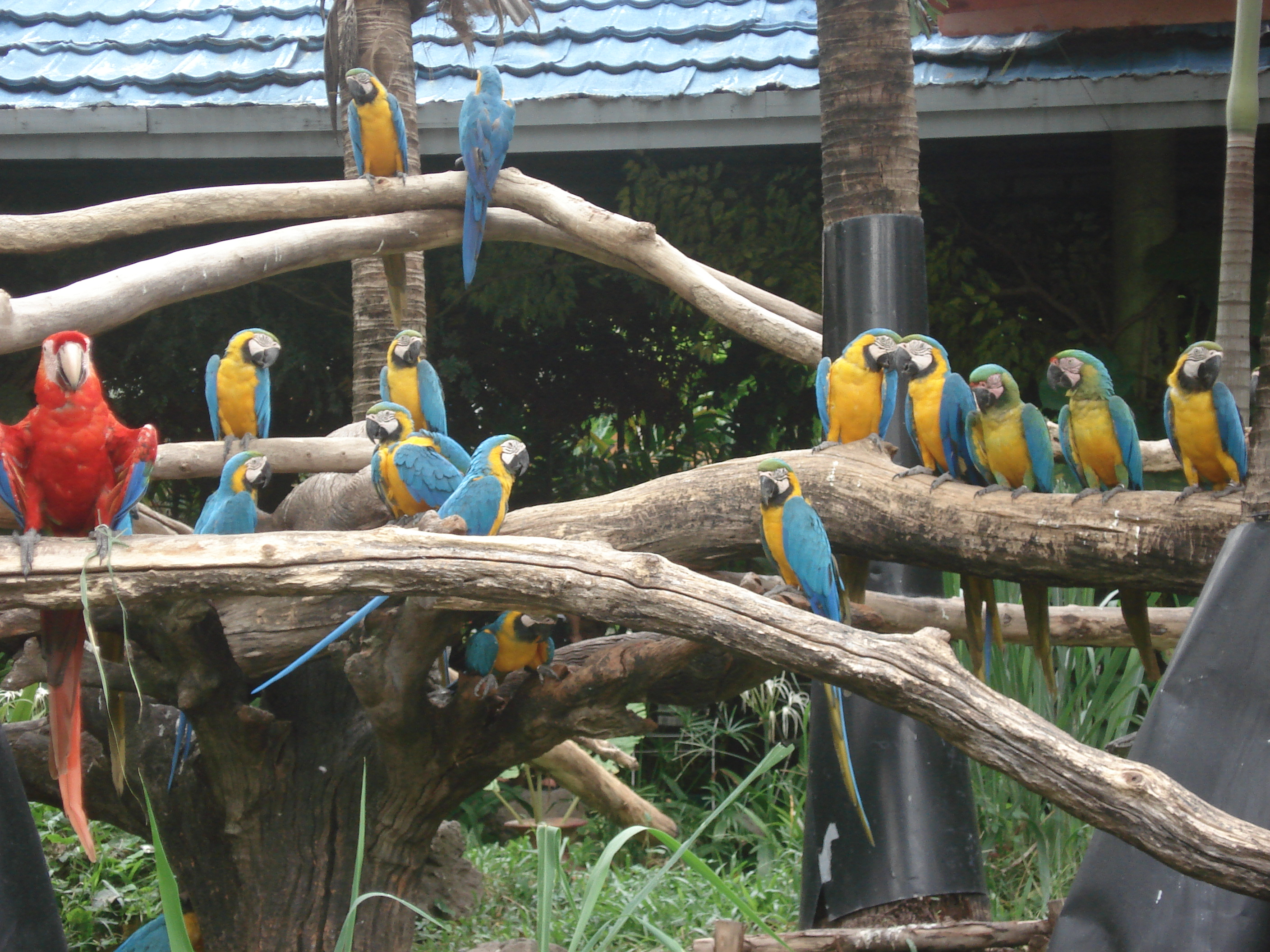 Ara